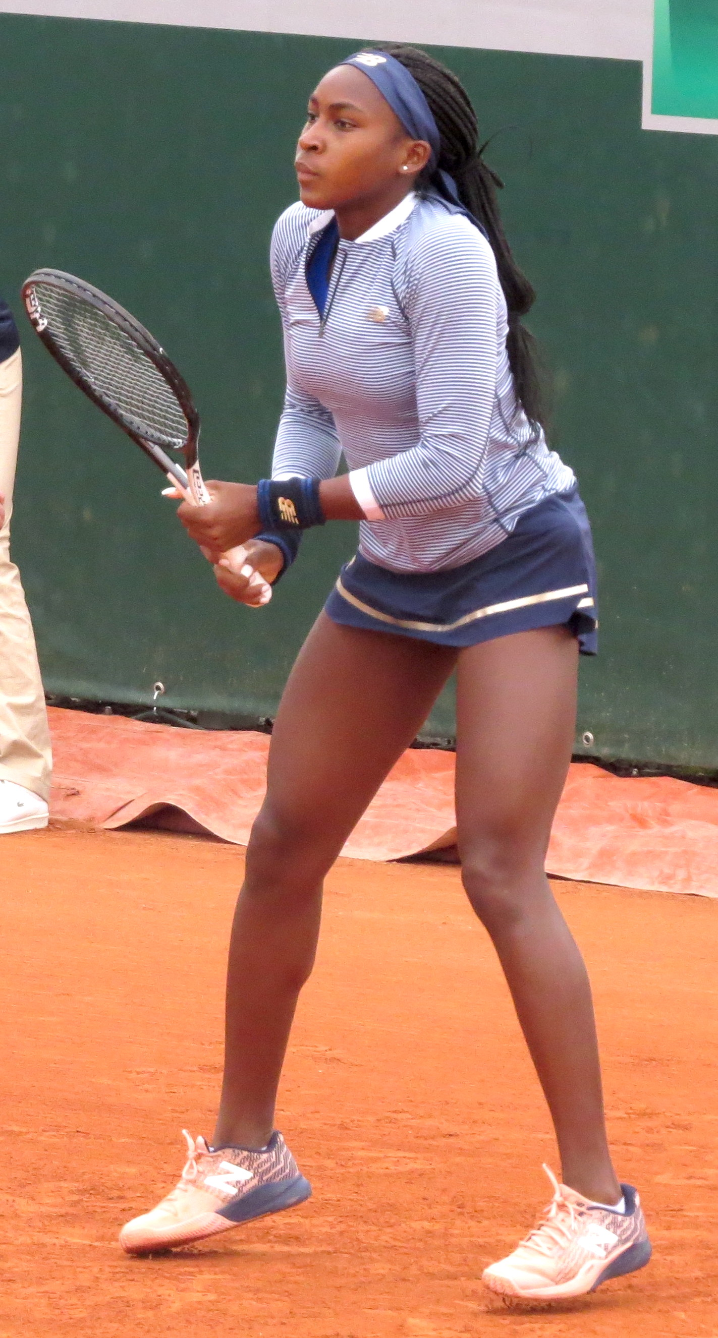 Cori Gauff lors de son premier tour des qualifications.